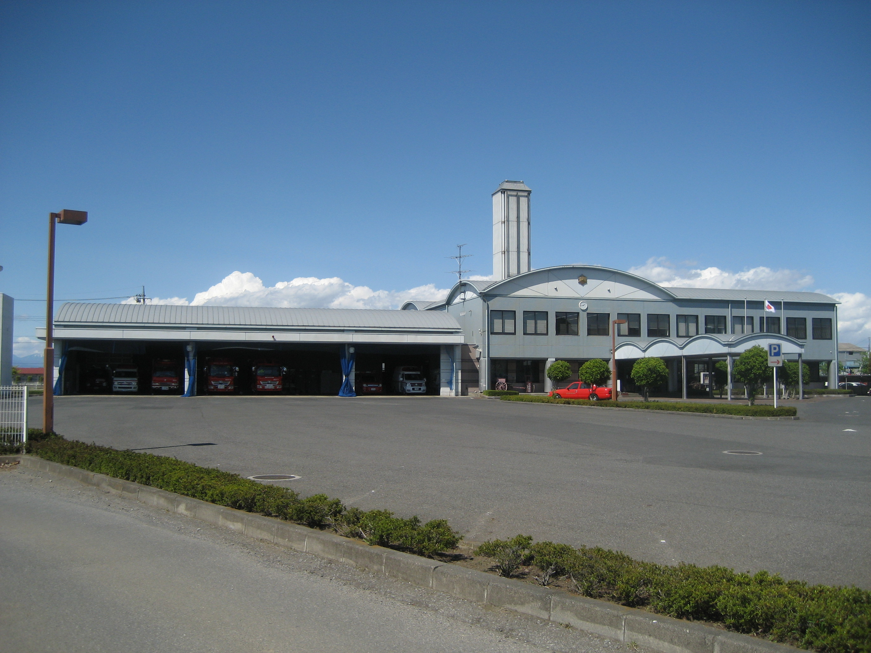 羽生市消防本部・消防署庁舎